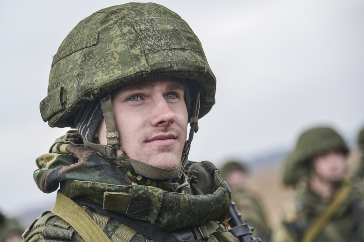 В Псковской области в ходе совместного российско-белорусского учения осуществлена высадка воздушного десанта.